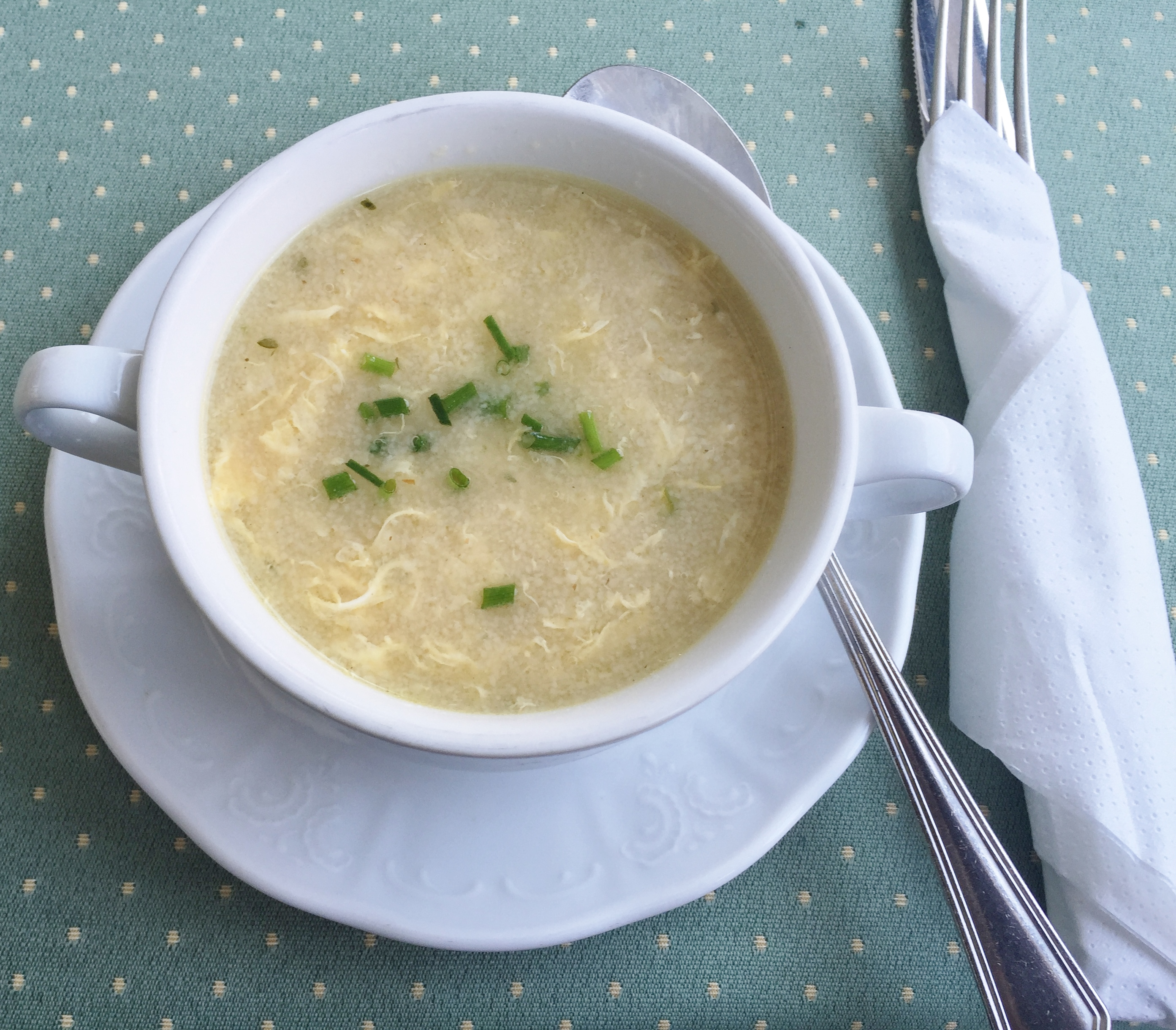 Legierte Grießsuppe, Grießsuppe mit Ei